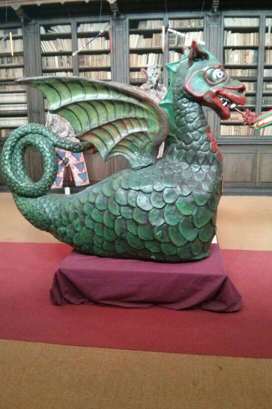 Figura del drac antic de Vilanova i la Geltrú, en una exhibició al Museu Balaguer de Vilanova i la Geltrú al 2013.